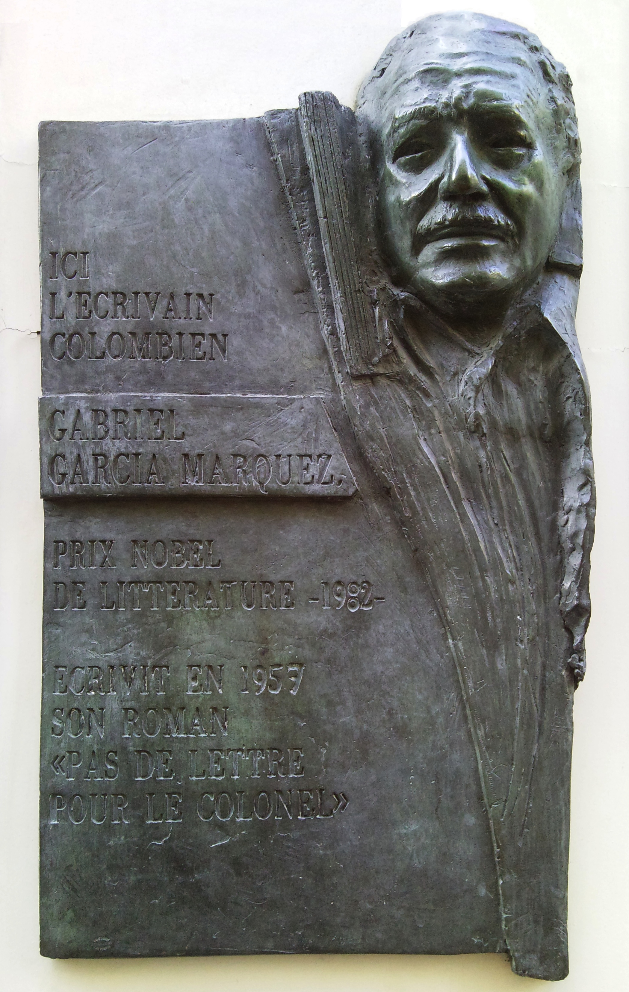 Gabriel García Márquez plaque - Rue Cujas, Paris 5.